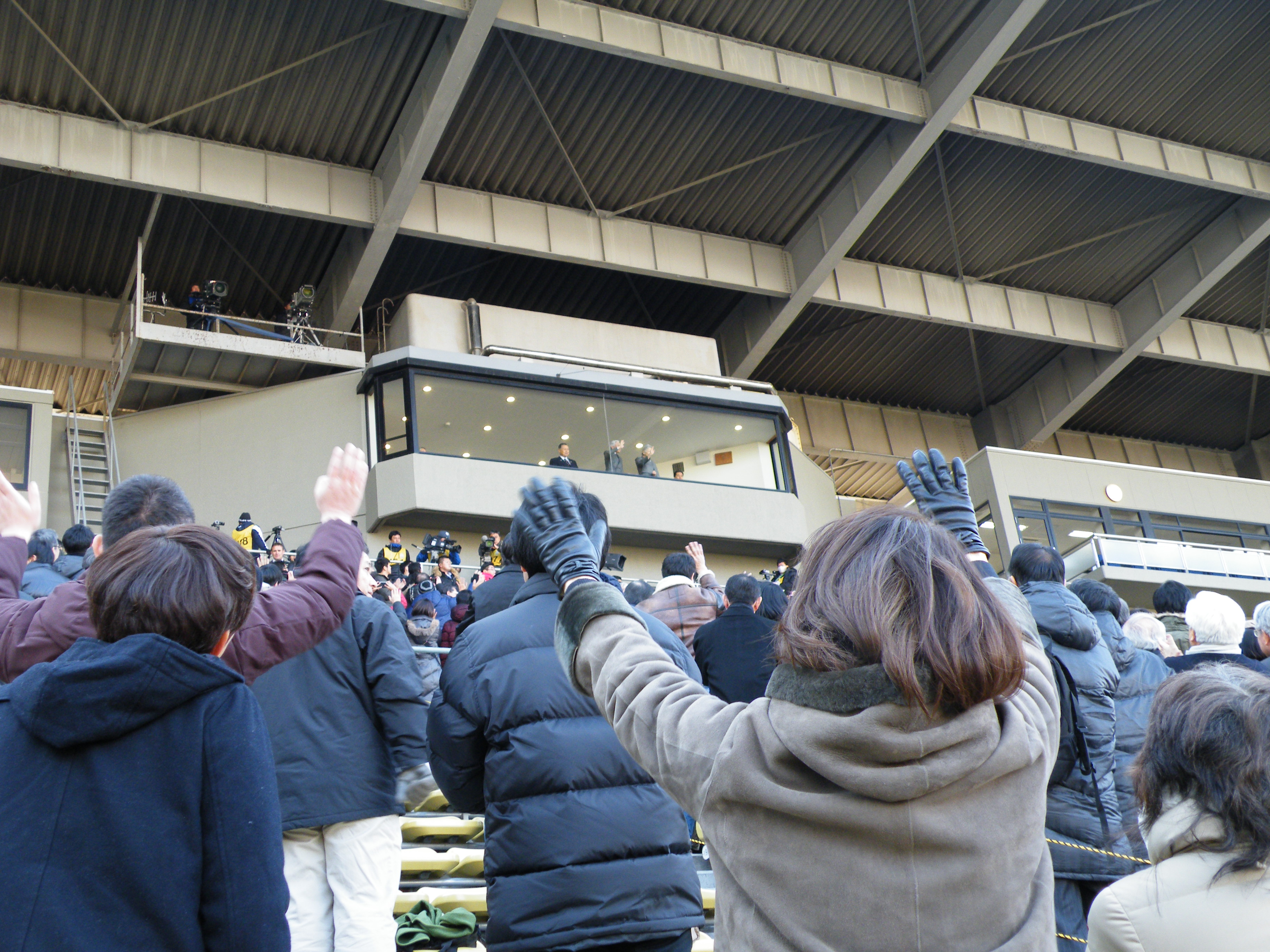 秩父宮ラグビー場にて開催された第51回日本ラグビーフットボール選手権大会2回戦（ヤマハ発動機ジュビロ対神戸製鋼コベルコスティーラーズ戦）をご観覧される、天皇皇后両陛下。